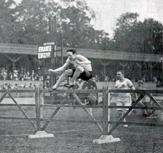 Jean Lecuyer, champion de France du 110 mètres haies en 1900 et 1901 (ici vainqueur du 120 yards haies en 1902 en Angleterre, face au South-London Harriers).